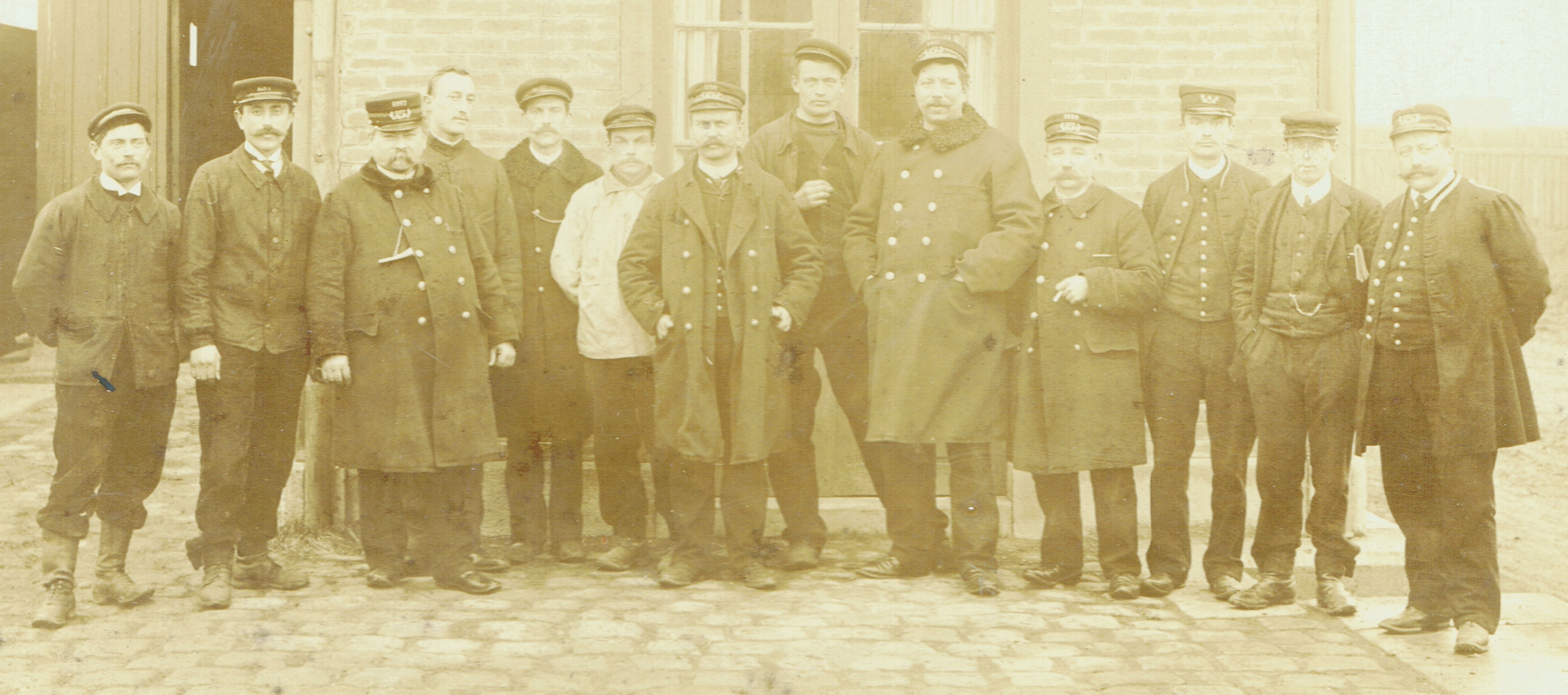 Tramway de Verneuil à Melun